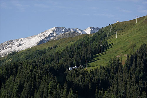 Splügen: Skigebiet Tambo